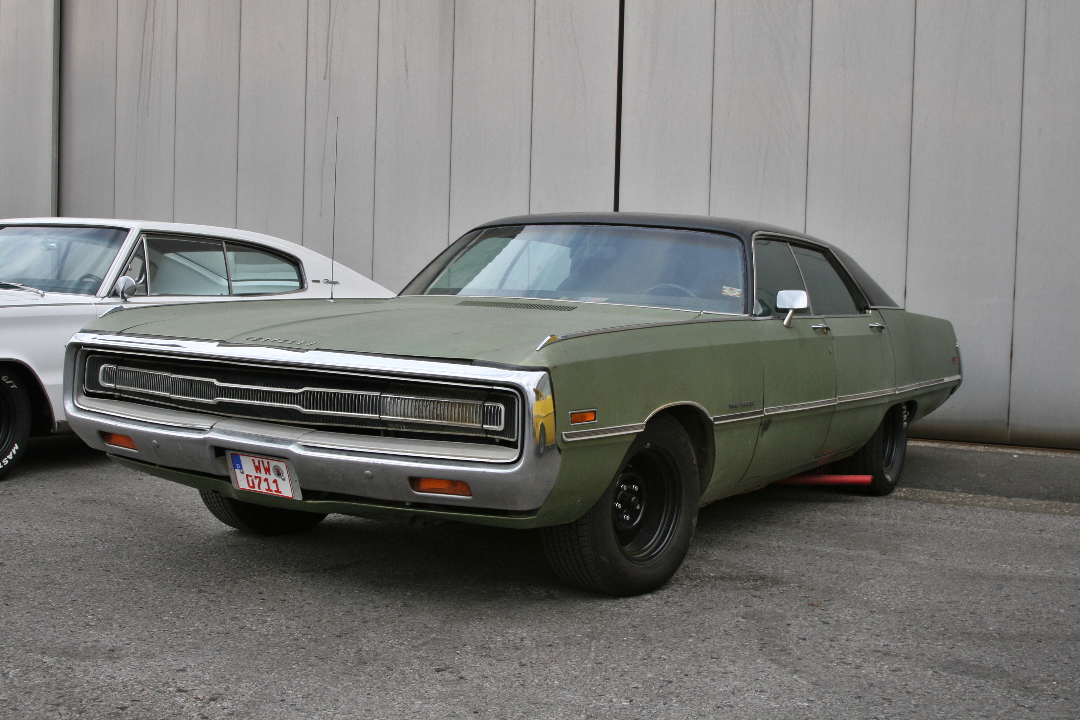 Zeche Ewald